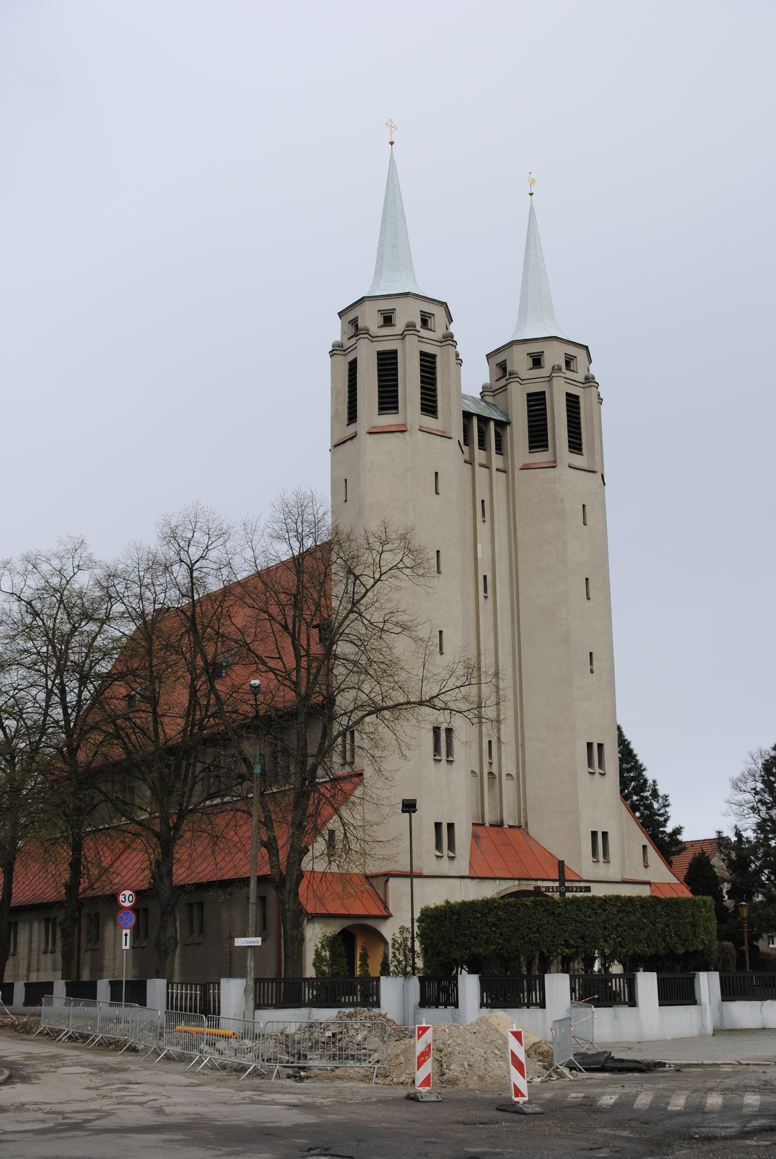 St. Josefskirche in Oppeln-Szczepanowitz